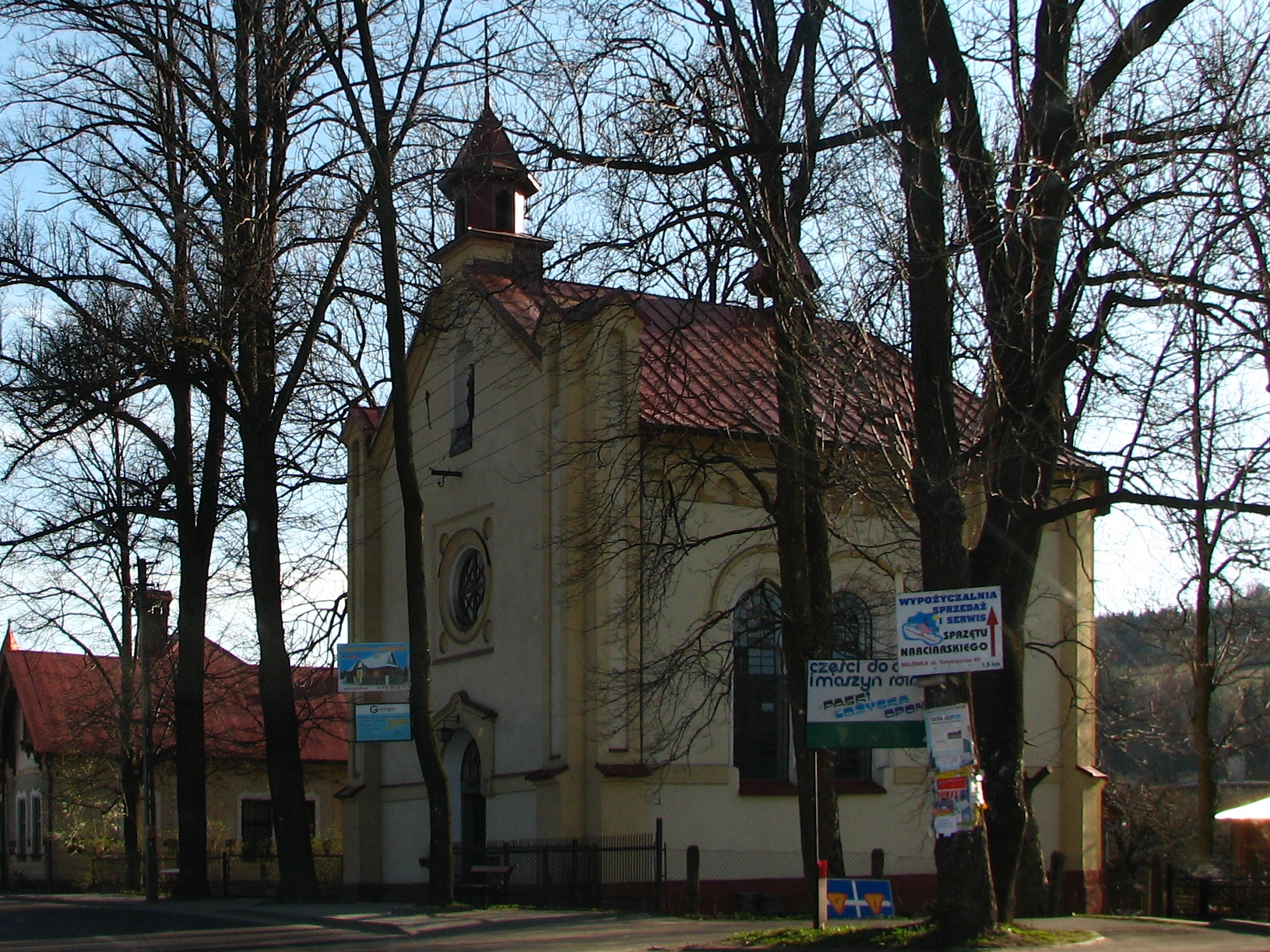 Kaplica św. Antoniego w Milówce.